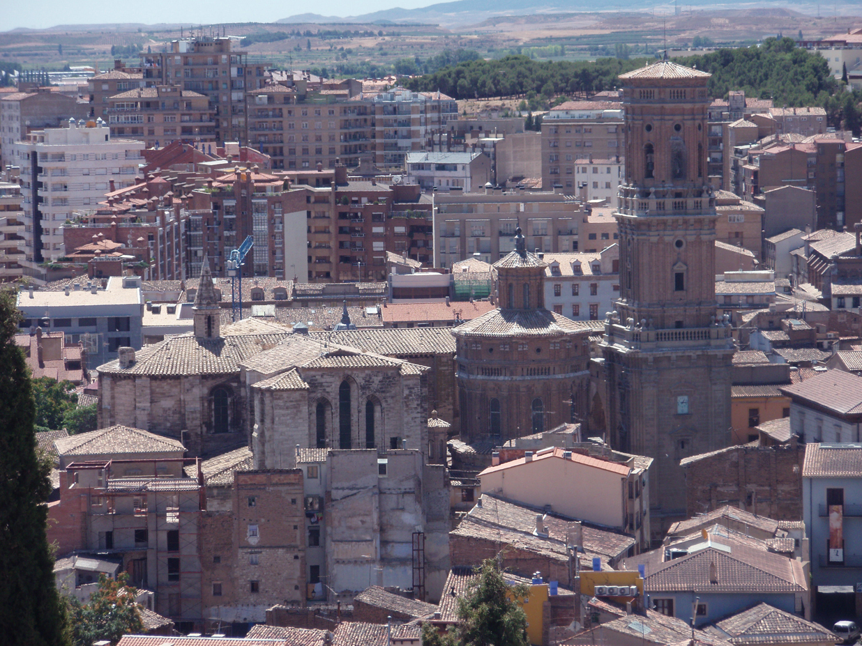 Panorámica de Tudela en 2009 desde el Corazón de Jesús, con la Catedral en primer término